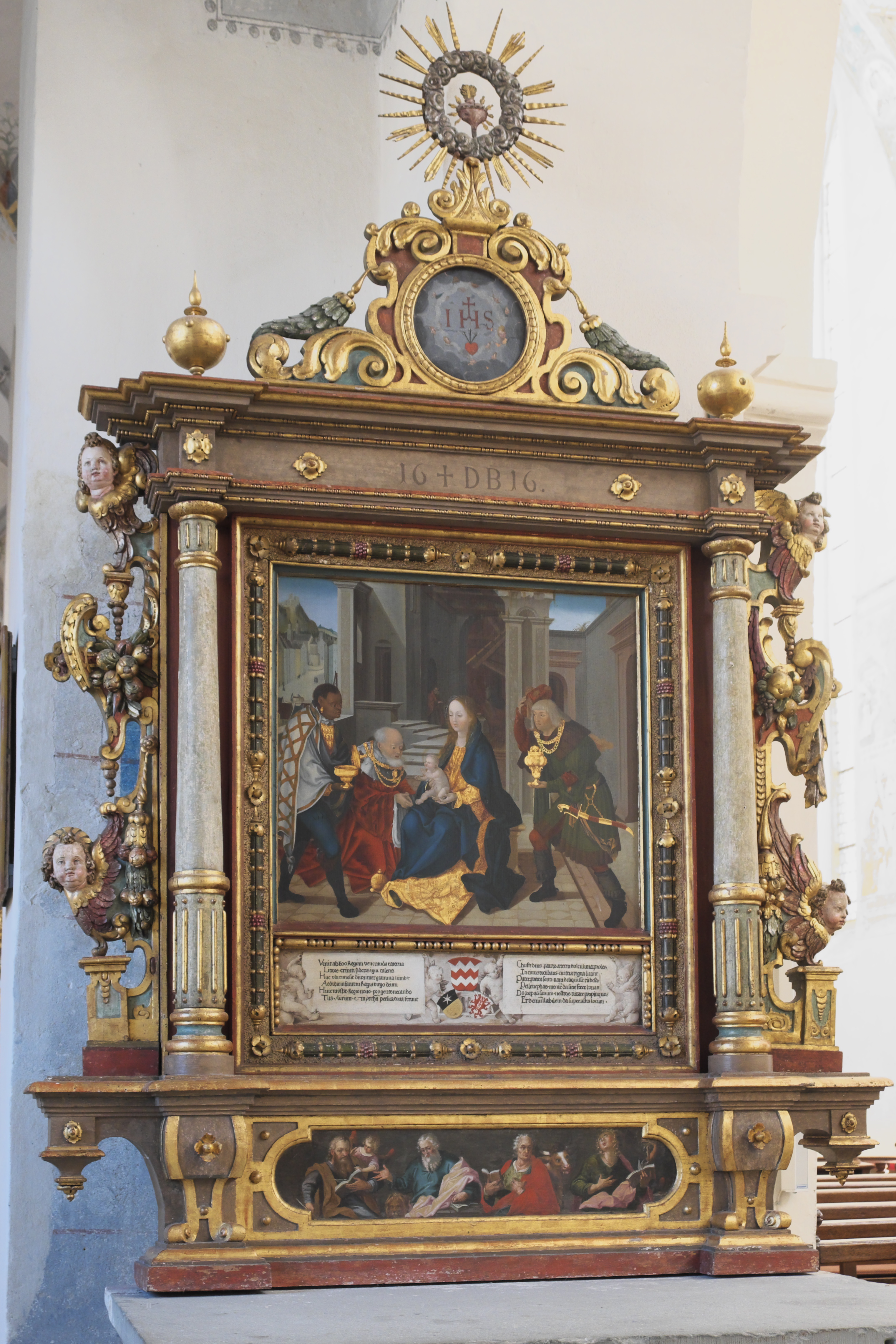 Katholische Pfarrkirche St. Anna, ehemalige Kirche des Zisterzienserinnenklosters in Heiligkreuztal (Altheim) im Landkreis Biberach (Baden-Württemberg/Deutschland), Dreikönigs-Altar von 1616